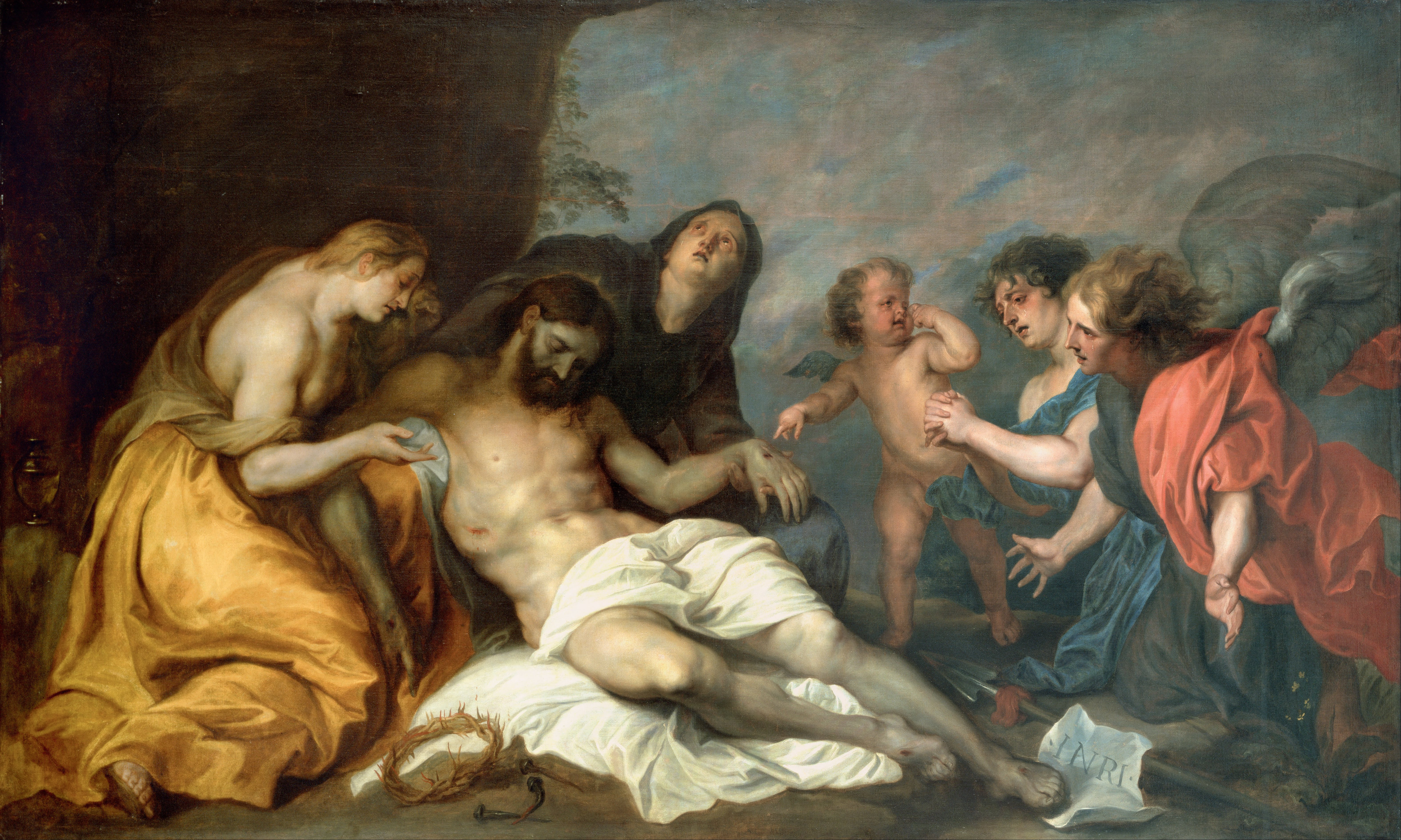 El lienzo muestra el momento en que los familiares y discípulos de Jesucristo se lamentan por su muerte en la cruz.